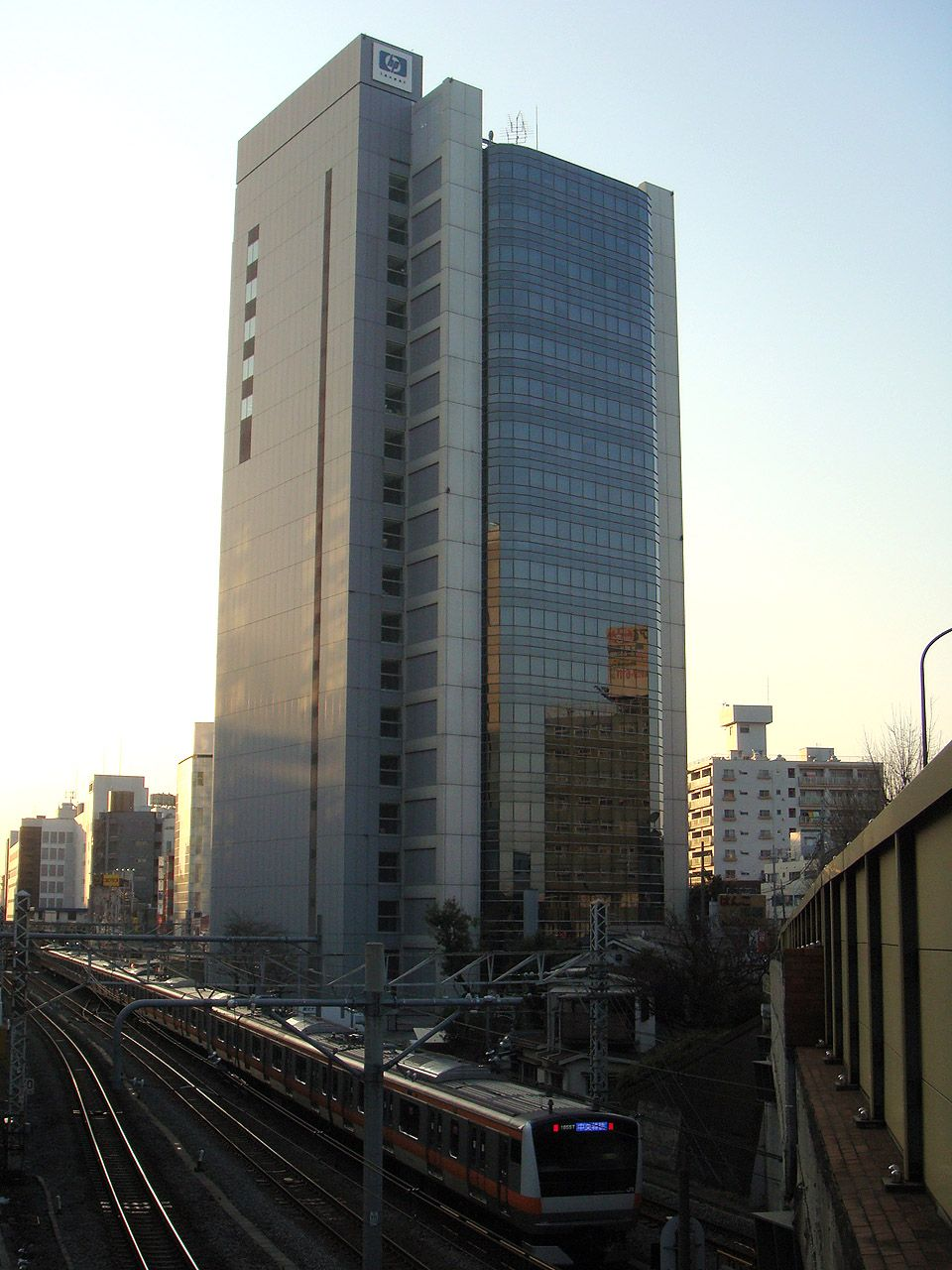 Hewlett-Packard Japan Ogikubo Office, Suginami-ku, Tokyo, Japan / 日本ヒューレットパッカード荻窪事業所（東京都杉並区）